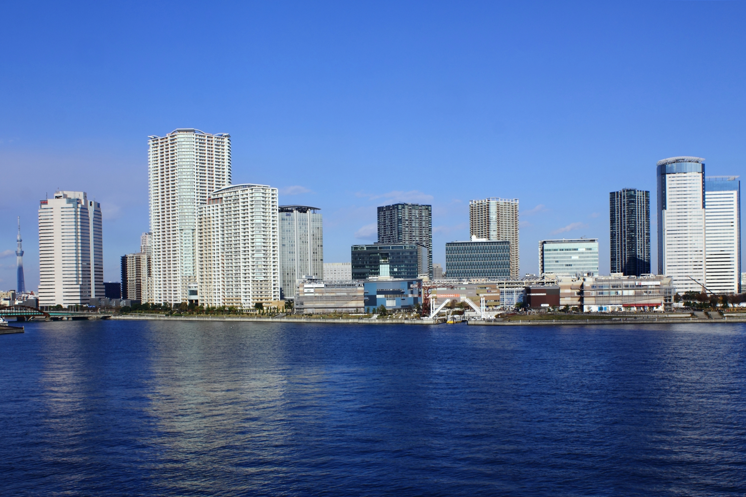 豊洲（晴海大橋より）